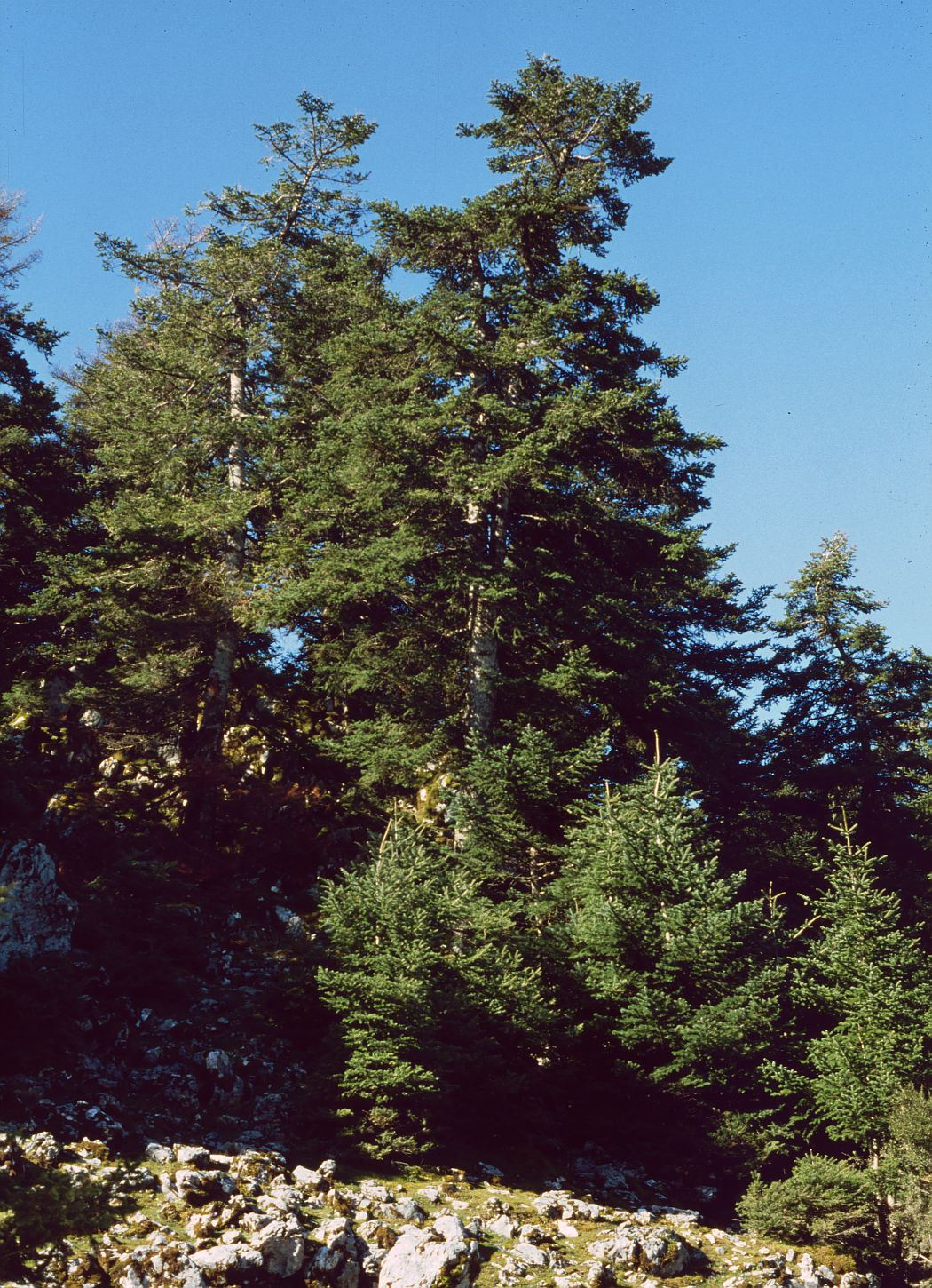 Abies cephalonica, Kieferngewächse (Pinaceae) – Griechenland/Ελλάδα/Greece: Berg Enos/Αίνος Όρος, SE Valsamata/Βαλσαμάτα, ca. 1100 m s.m. (Kefallinia/Κεφαλληνία)